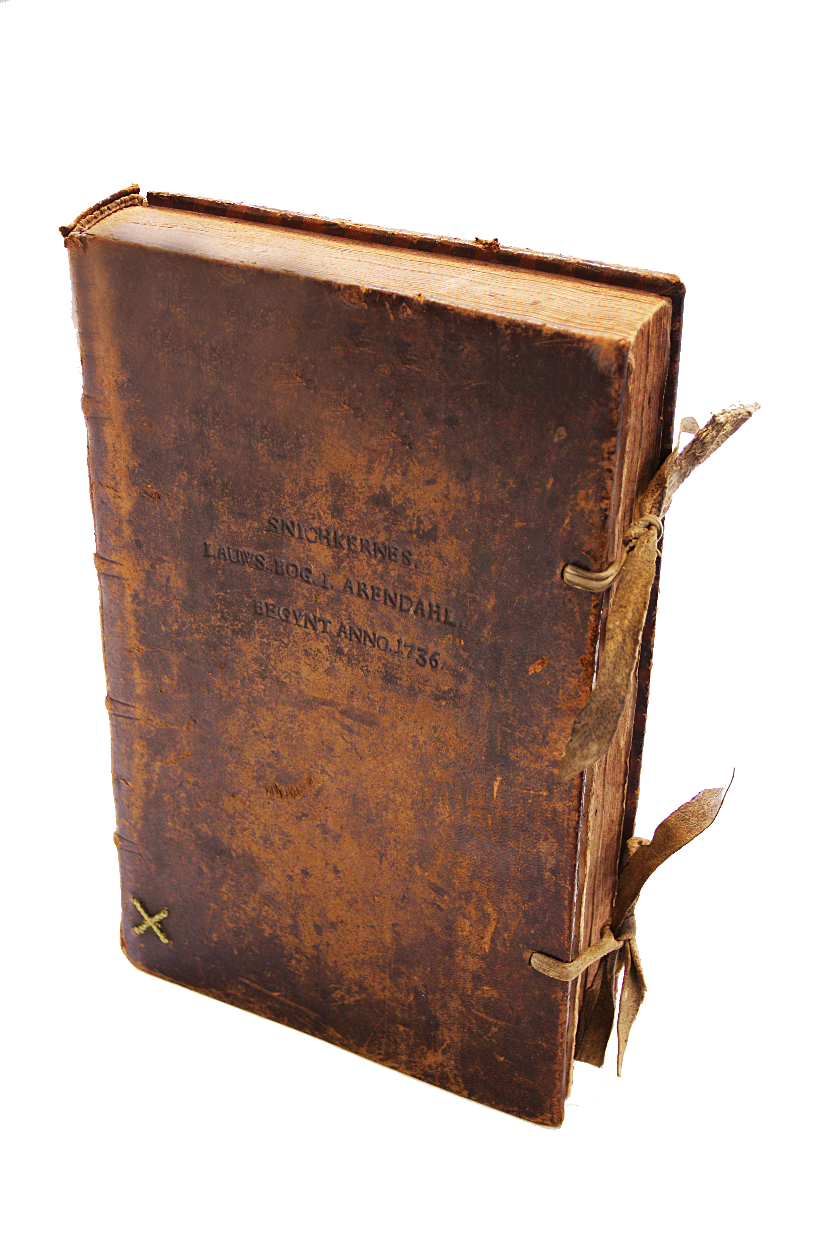 Laugsbok fra 1737